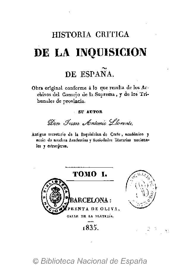 Historia critica de la inquisicion de España : obra original conforme a lo que resulta de los archivos del Consejo de la Suprema y de los Tribunales de provincia su autor, Juan Antonio Llorente Autor: Llorente, Juan Antonio (1756-1823) Fecha: entre 1835 y 1836 Datos de edición: Barcelona, Imp. de Oliva